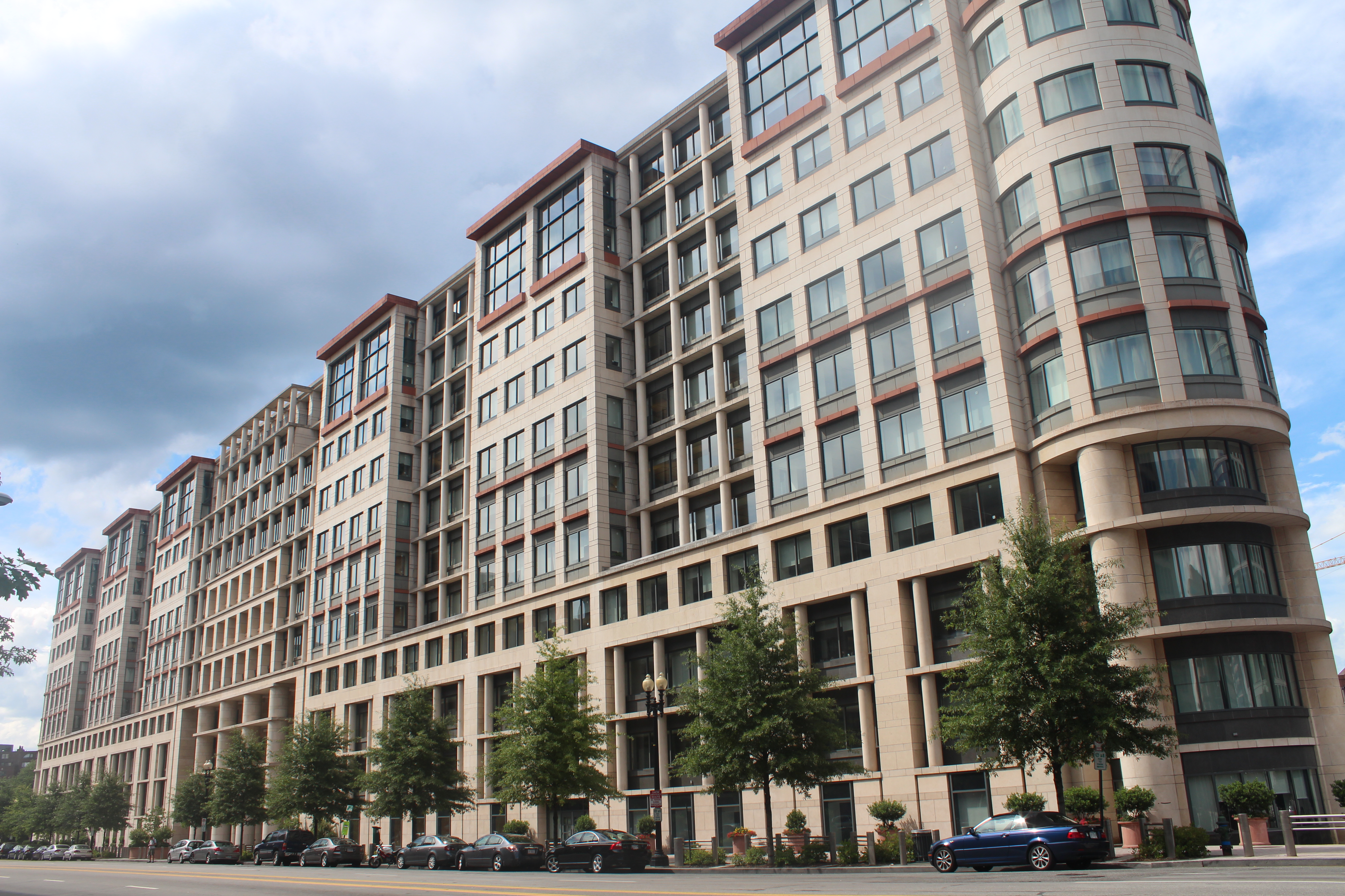 Sidejo de Internacia Financa Korporacio, en Vaŝingtono, D.K., Usono.